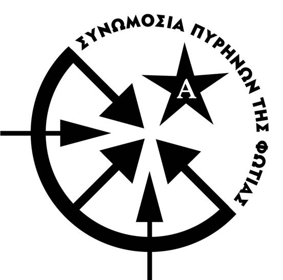 Logotipo da organização anarquista revolucionária "Conspiração das Células de Fogo", baseada na Grécia.